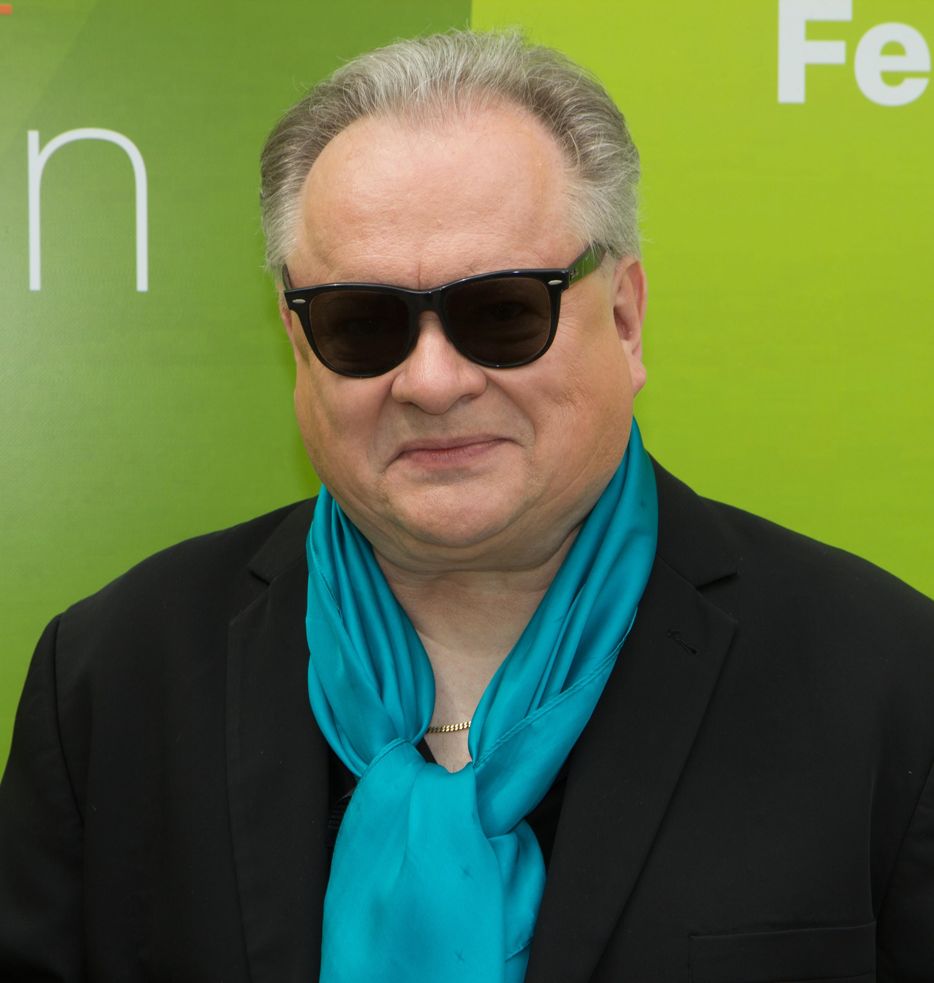 Heinz Rudolf Kunze als Gast beim ZDF-Fernsehgarten am 13. Mai 2018 in Mainz.